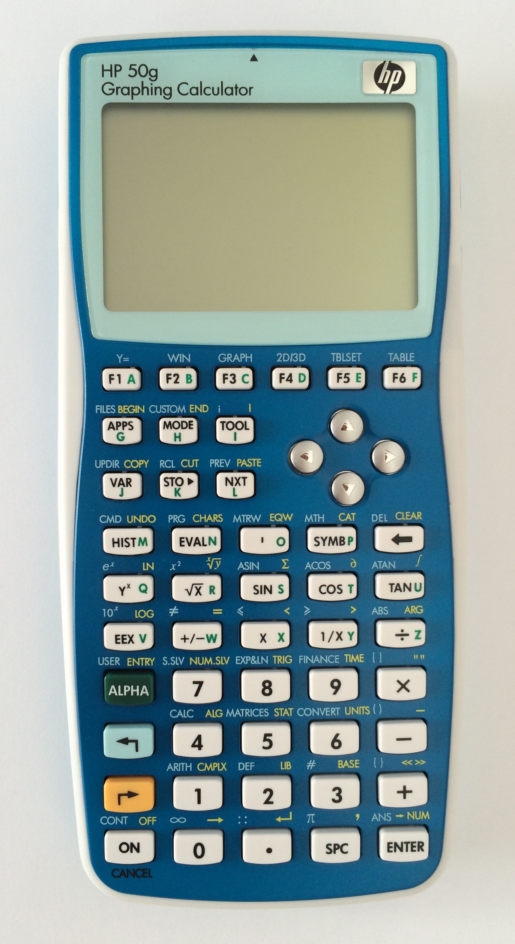 Modelo de color azul de la calculadora HP 50G. Vista frontal.